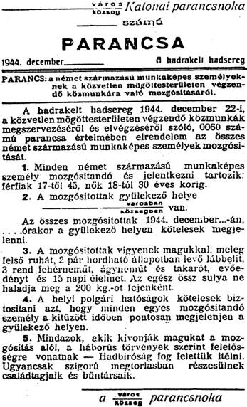 A 2. Ukrán Front parancsnoka, Malinovszkij marsall és a 3. Ukrán Front parancsnoka, Tolbuhin marsall által 1944. december 22-én kiadott parancs a német származású munkaképes személyeknek a közvetlen mögöttes területen végzendő közmunkára való mozgósításról